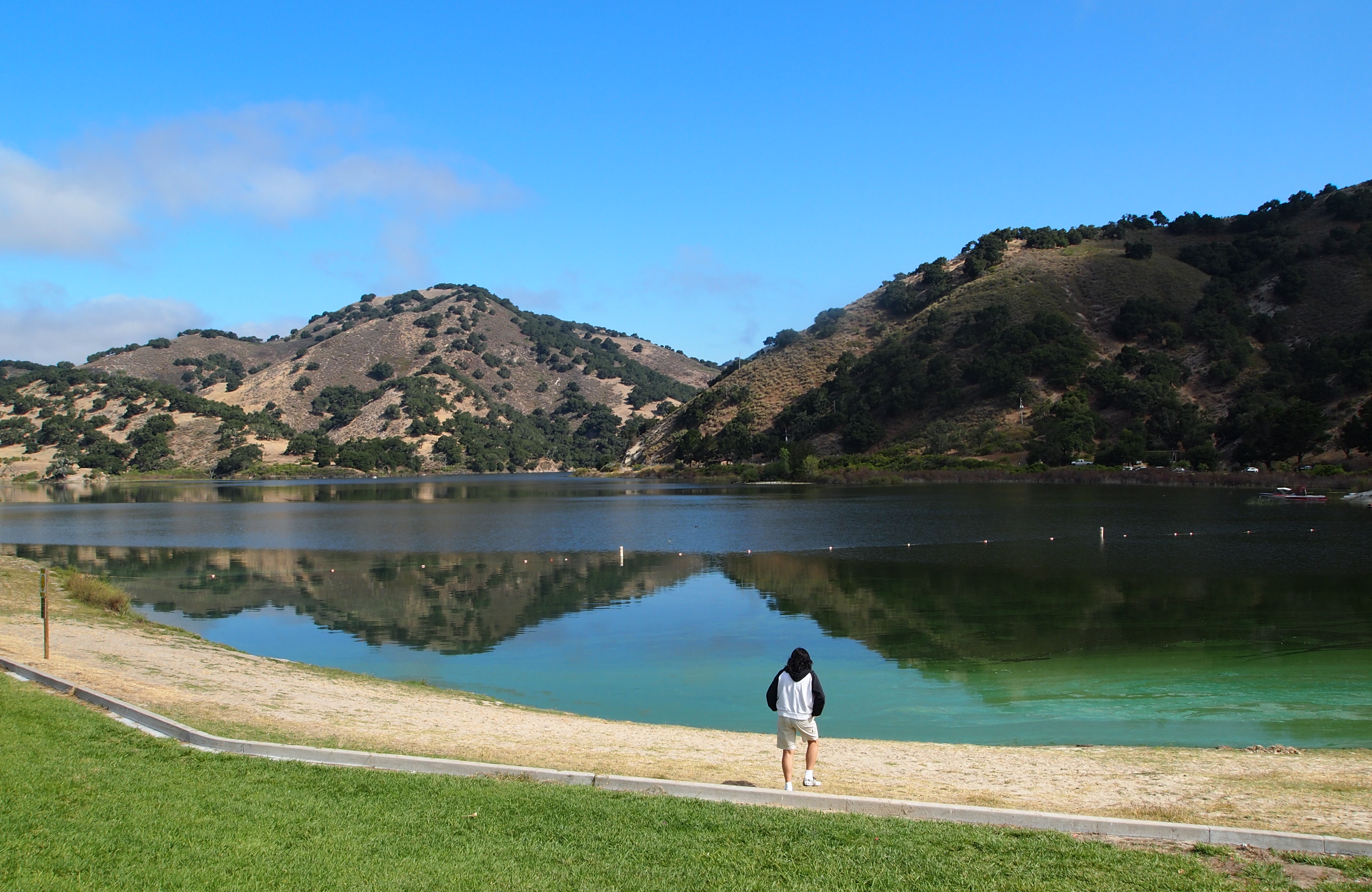 Picture 067